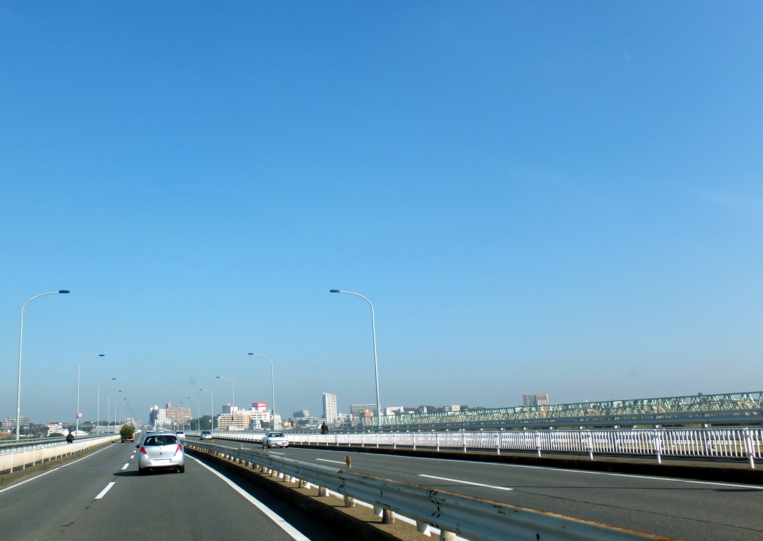 大利根橋付近